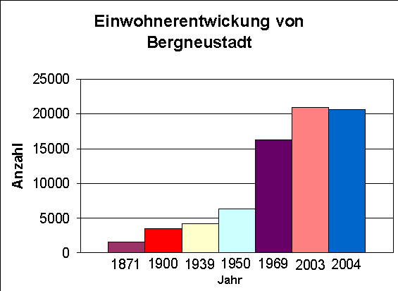 Bevölkerungsentwicklung von Bergneustadt 1871-2004